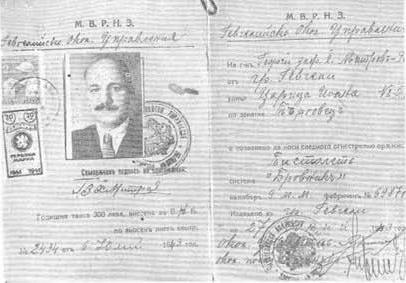 Разрешително за носене на оръжие на Георги Хаджимитрев.